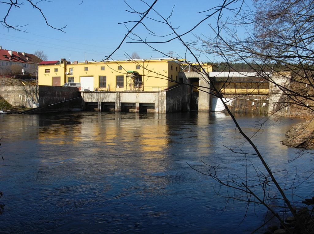 Zapora i elektrownia wodna w Smukale (Bydgoszcz)